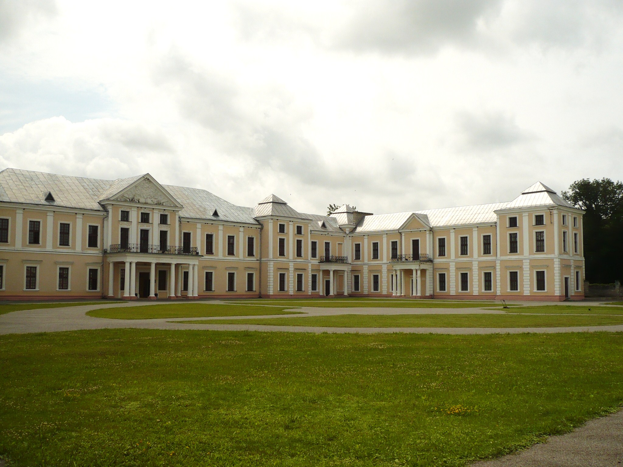 Wiśniowiec, pałac